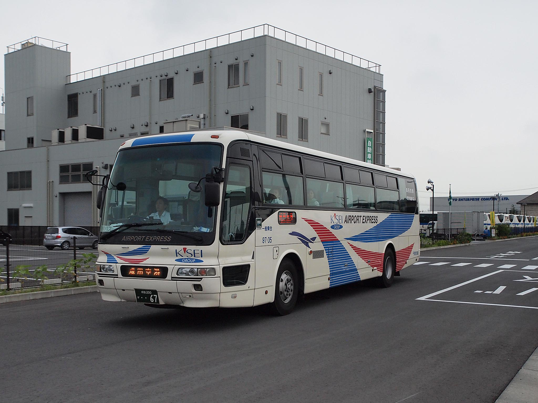 佐野新都市バスターミナルを出発する成田空港リムジン「サルビア」千葉交通便。背後の建物はJRバス佐野支店。 型式：三菱ふそうエアロバス PJ-MS86JP 登録番号：成田200か・・67 社番：97-35